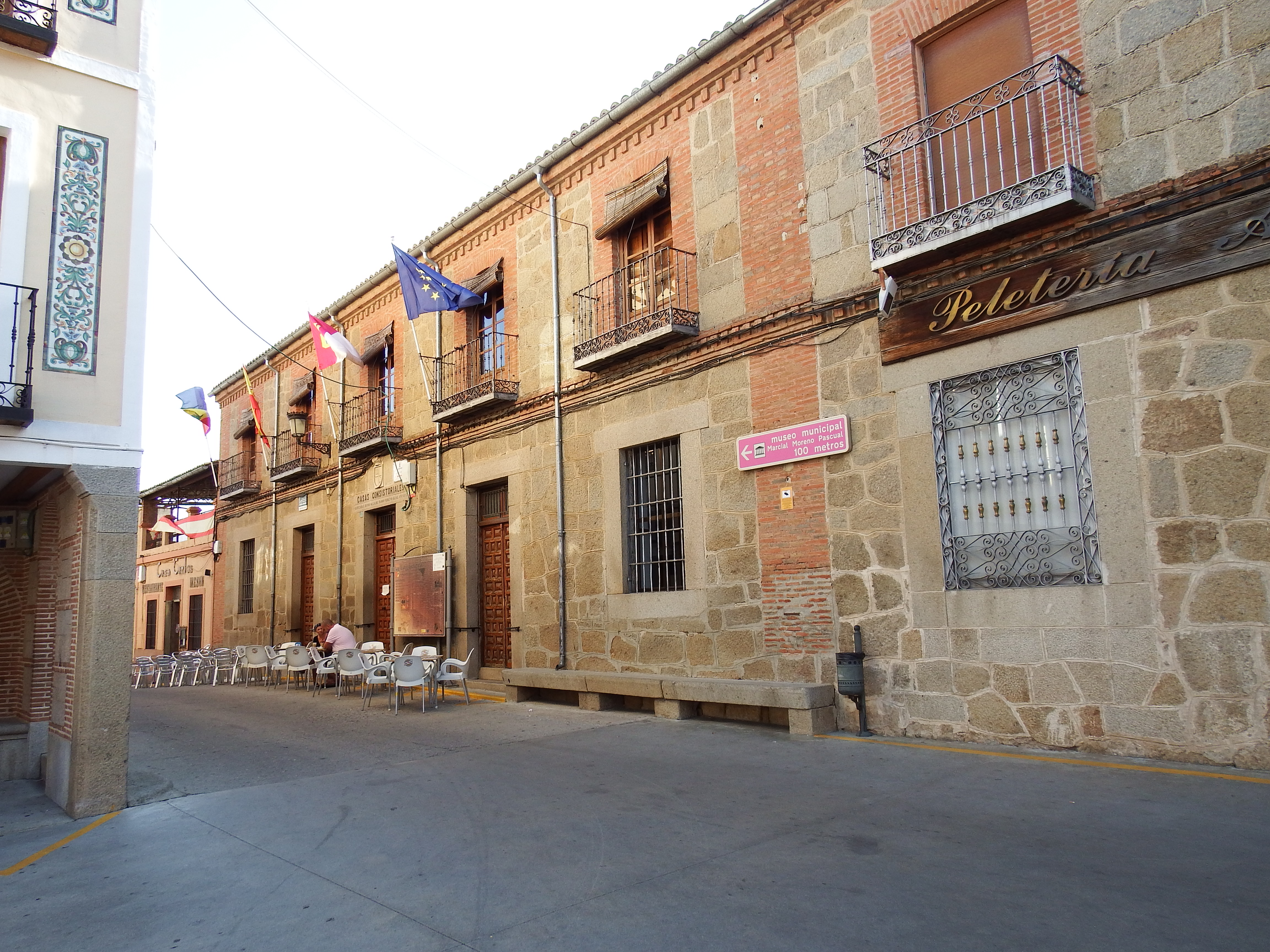 Lagartera, Toledo